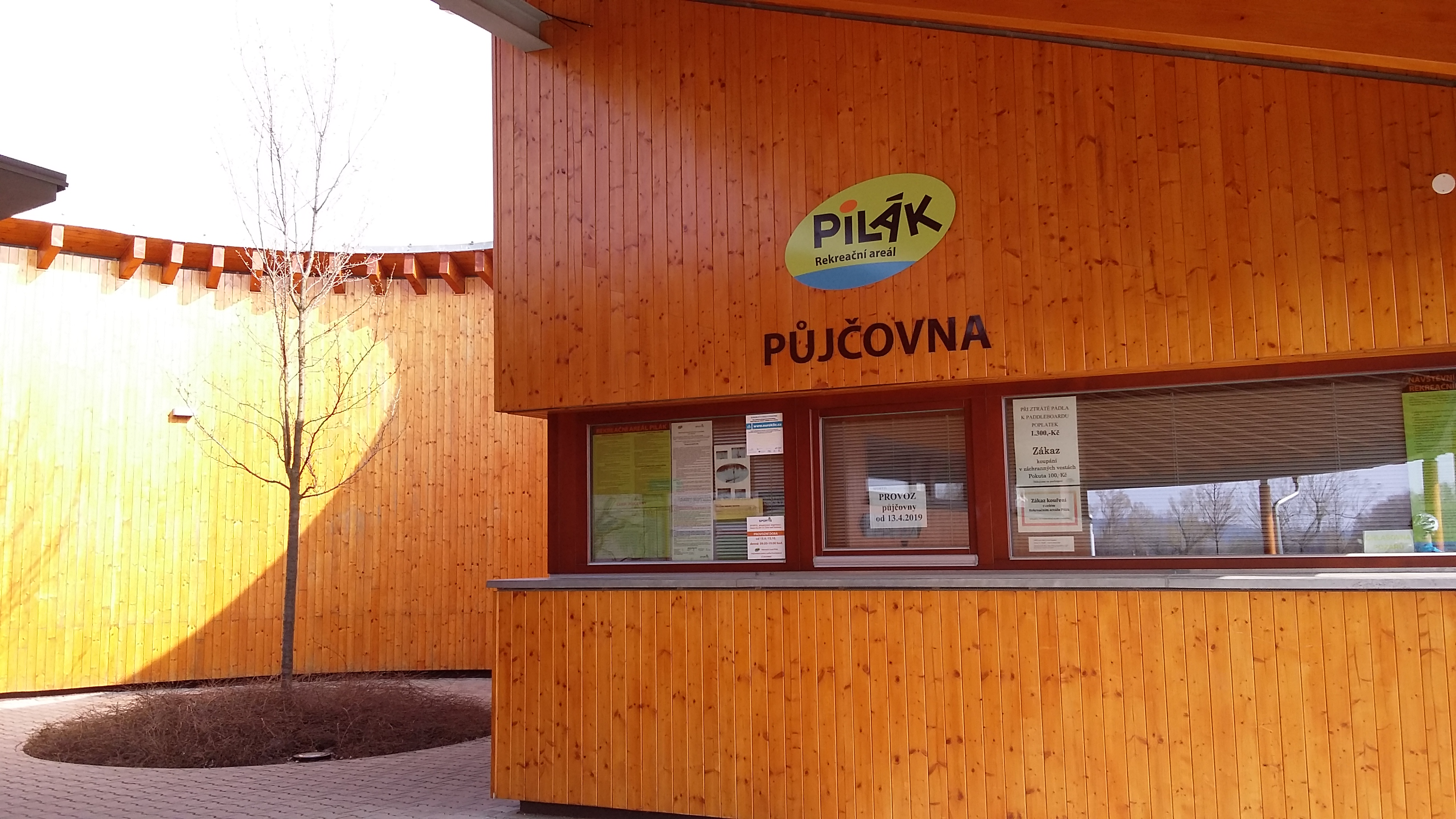 Půjčovna sportovních potřeb, rekreační areál Pilák, Pilská vodní nádrž, Žďár nad Sázavou.